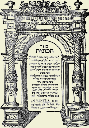 ספר הכונות דפוס ראשון